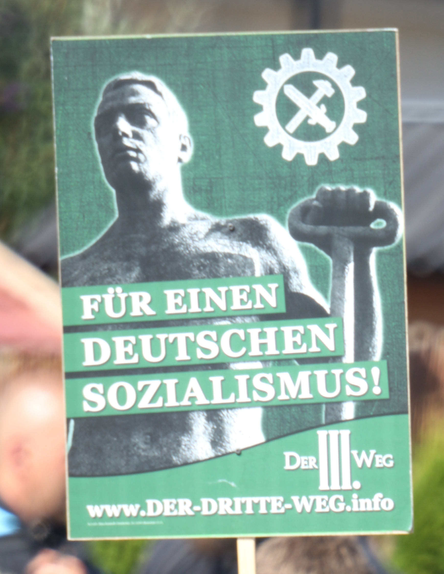 Plakat der neonazistischen Partei "Der III. Weg".